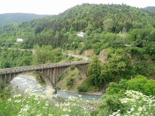 река Паца